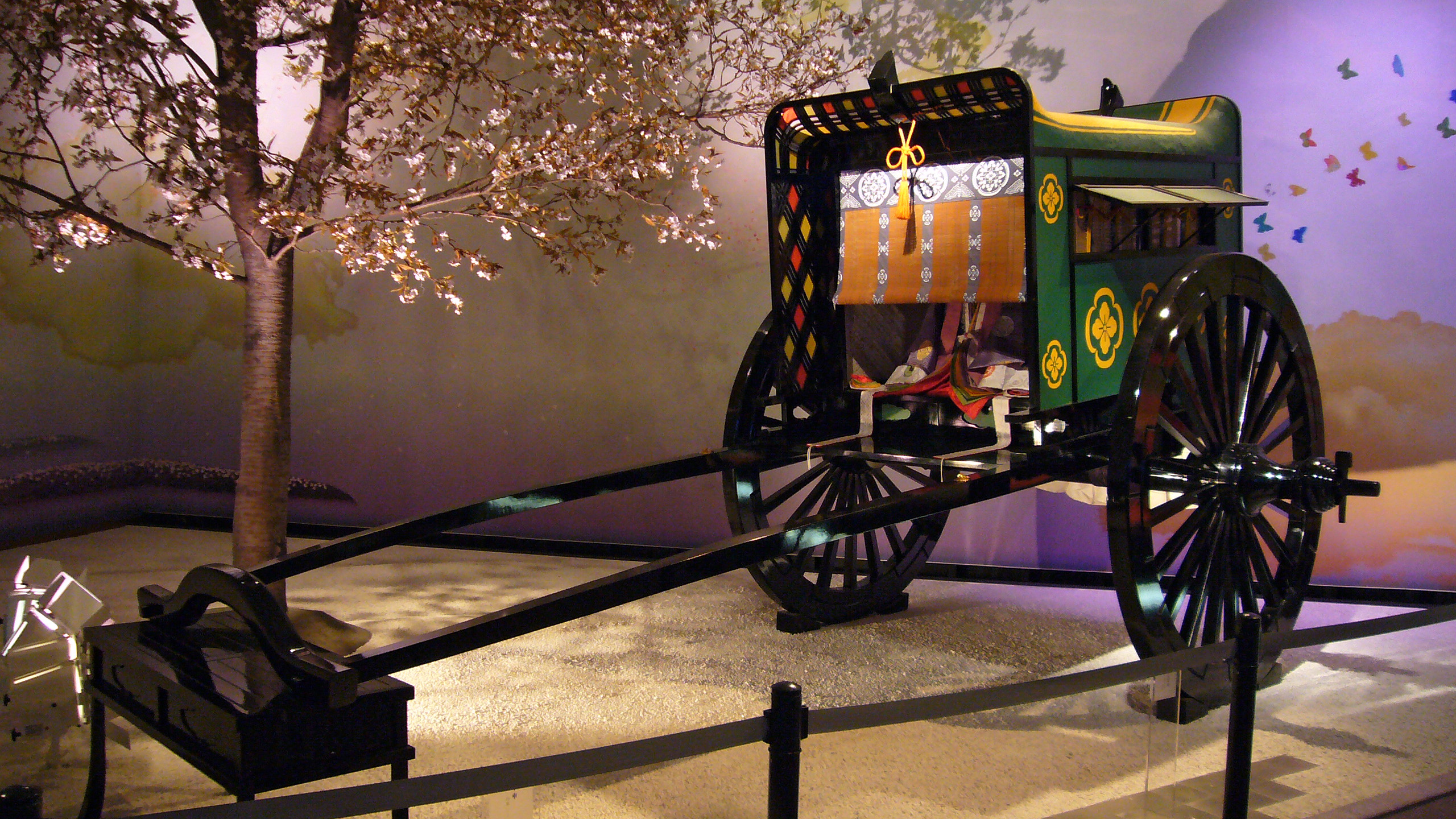 Genji museum in Uji, Kyoto, Japan